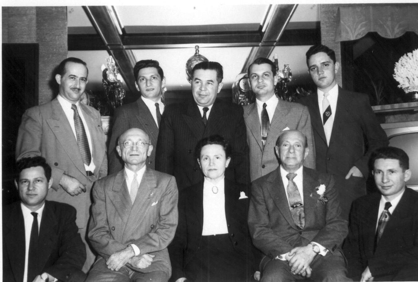 קבוצת תלמידים בבית הספר המקצועי בבוסטון עם אנשי הקהילה היהודית שני מימין אפרים מונוסון